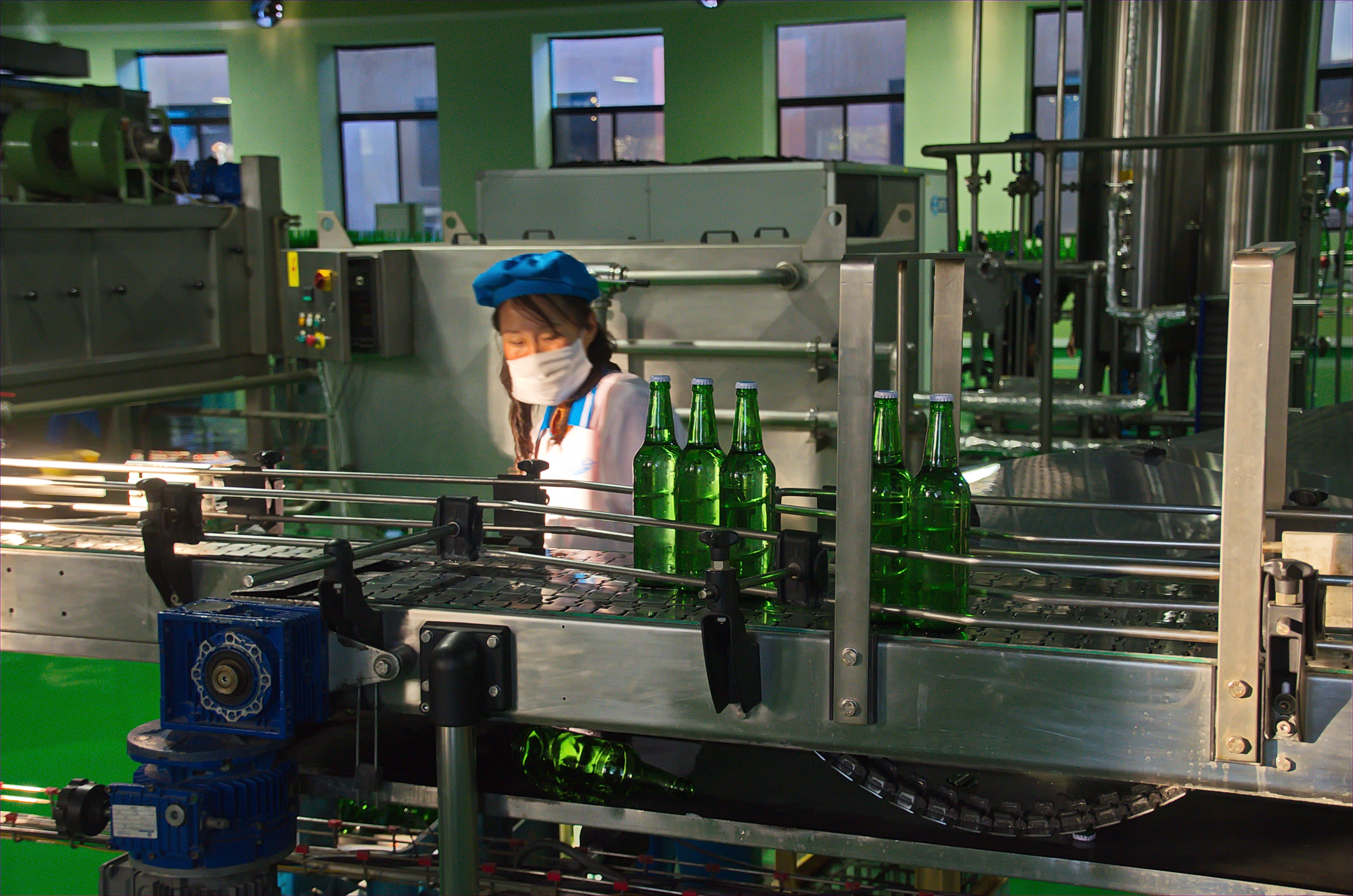 Nordkorea 2015 - Mineralwasserabfüllung Kangso Yaksu